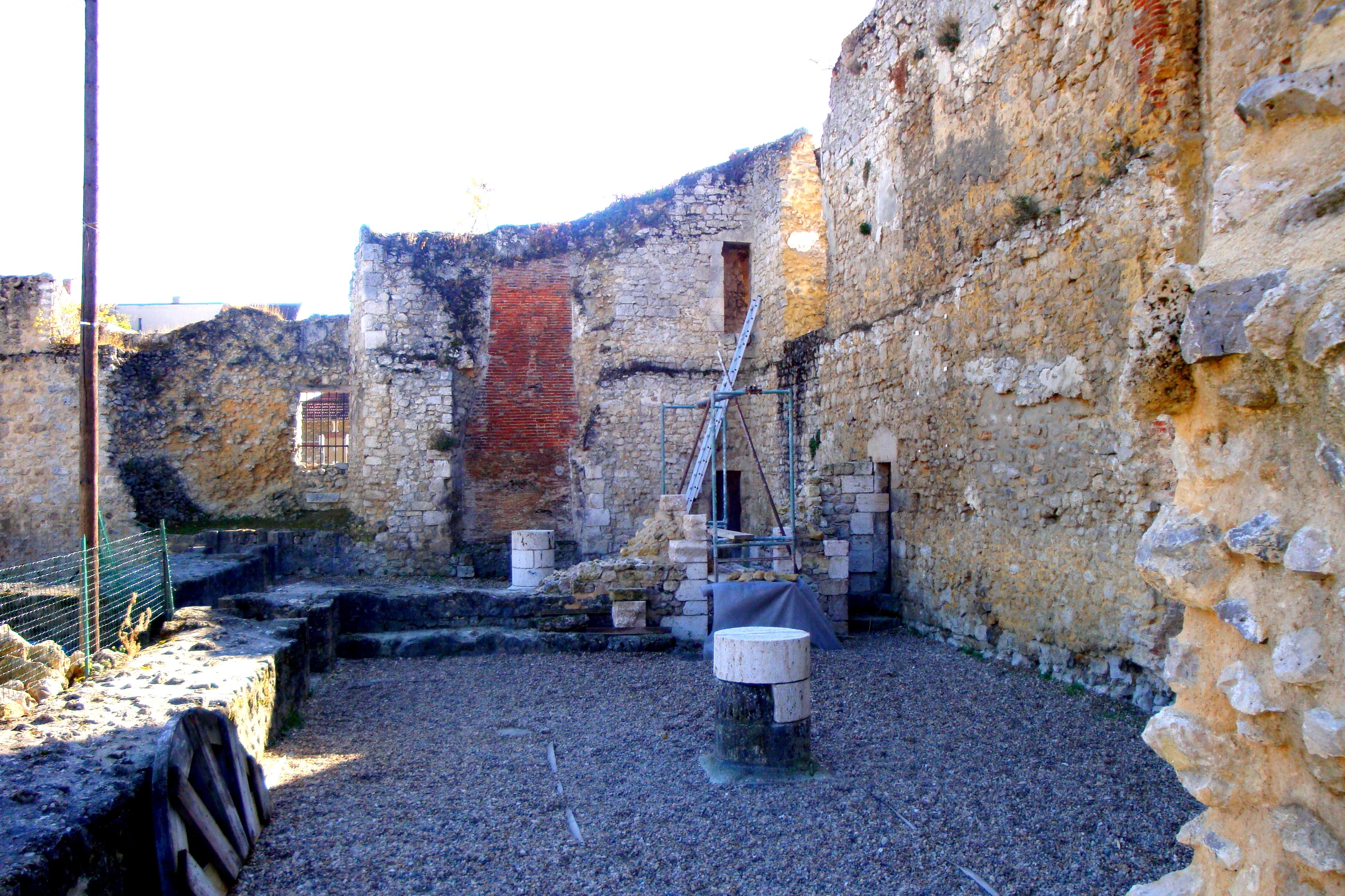 Château de Brie-Comte-Robert